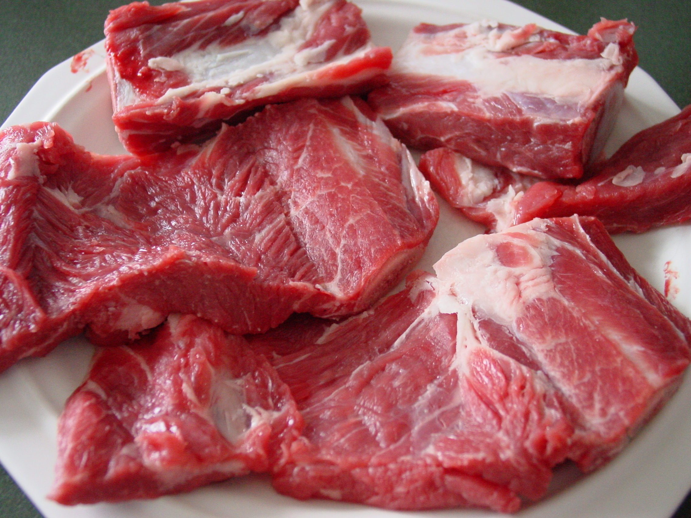 Découpe de bœuf